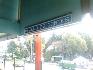 letrero de la estación Villa de Cortes del metro de la cuidad de Mexico